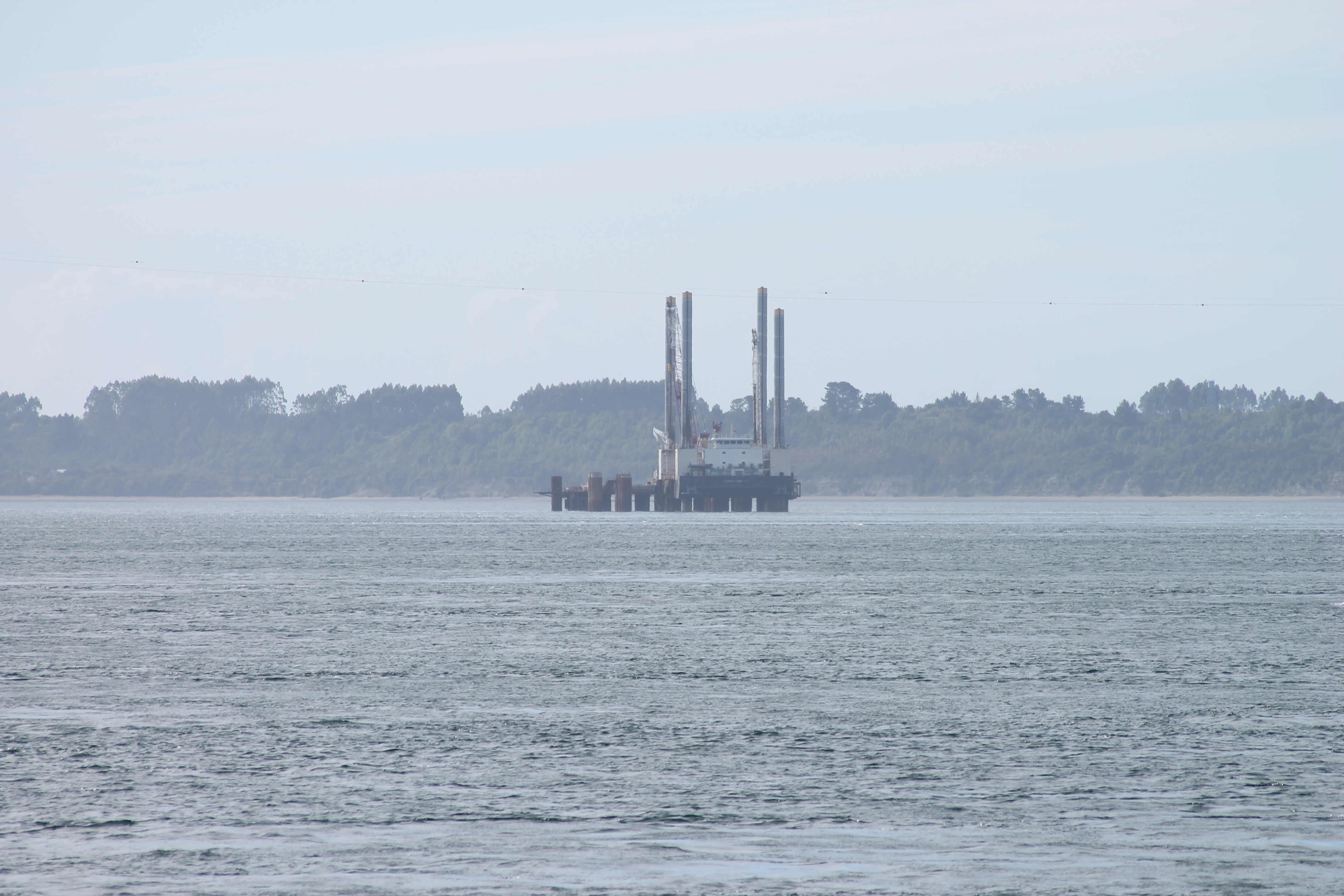 Průliv Chacao, stavba mostu